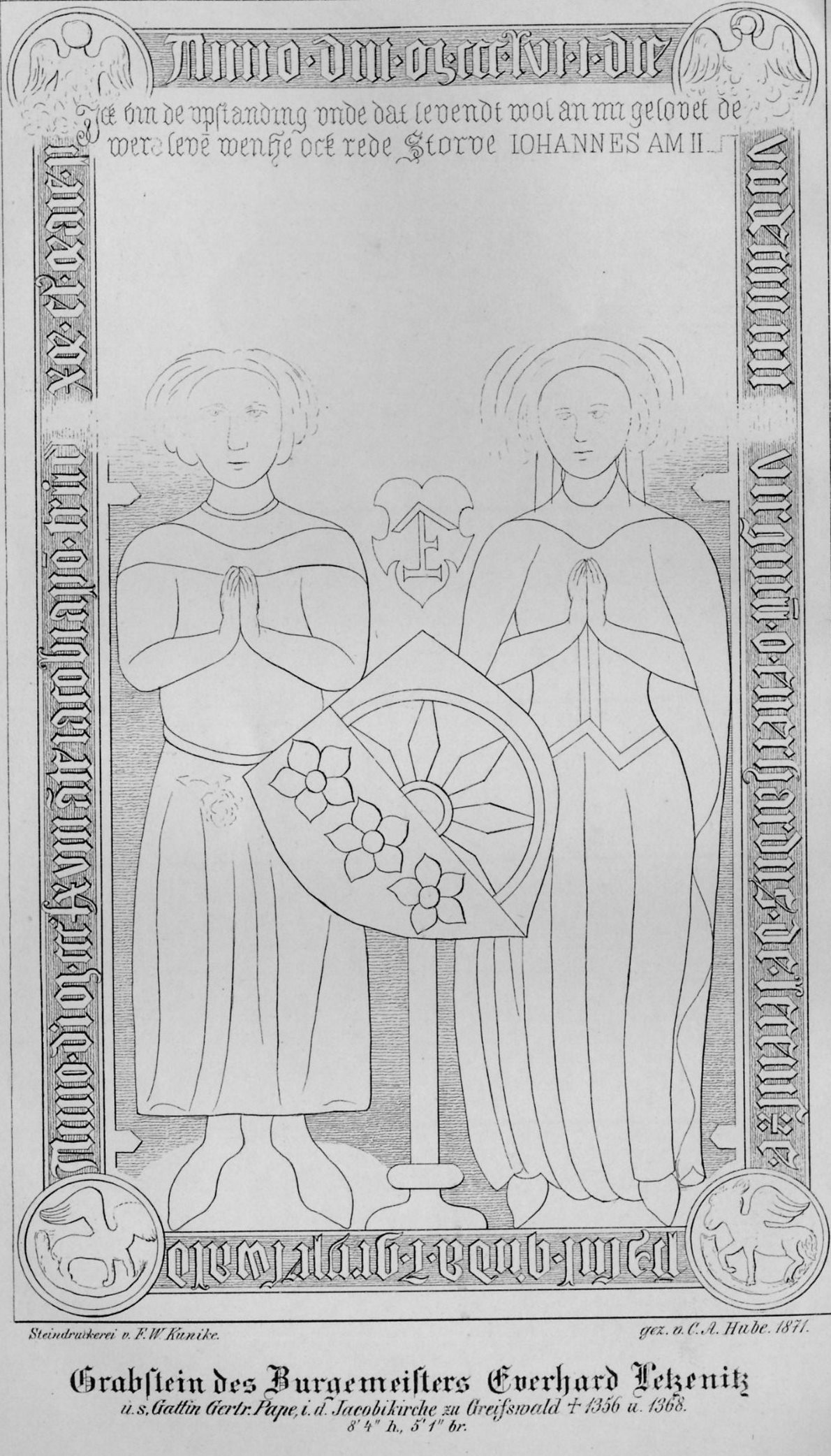 Grabplatte des Greifswalder Bürgermeisters Everhard von Letzenitz. Zeichnung aus dem Jahr 1873.